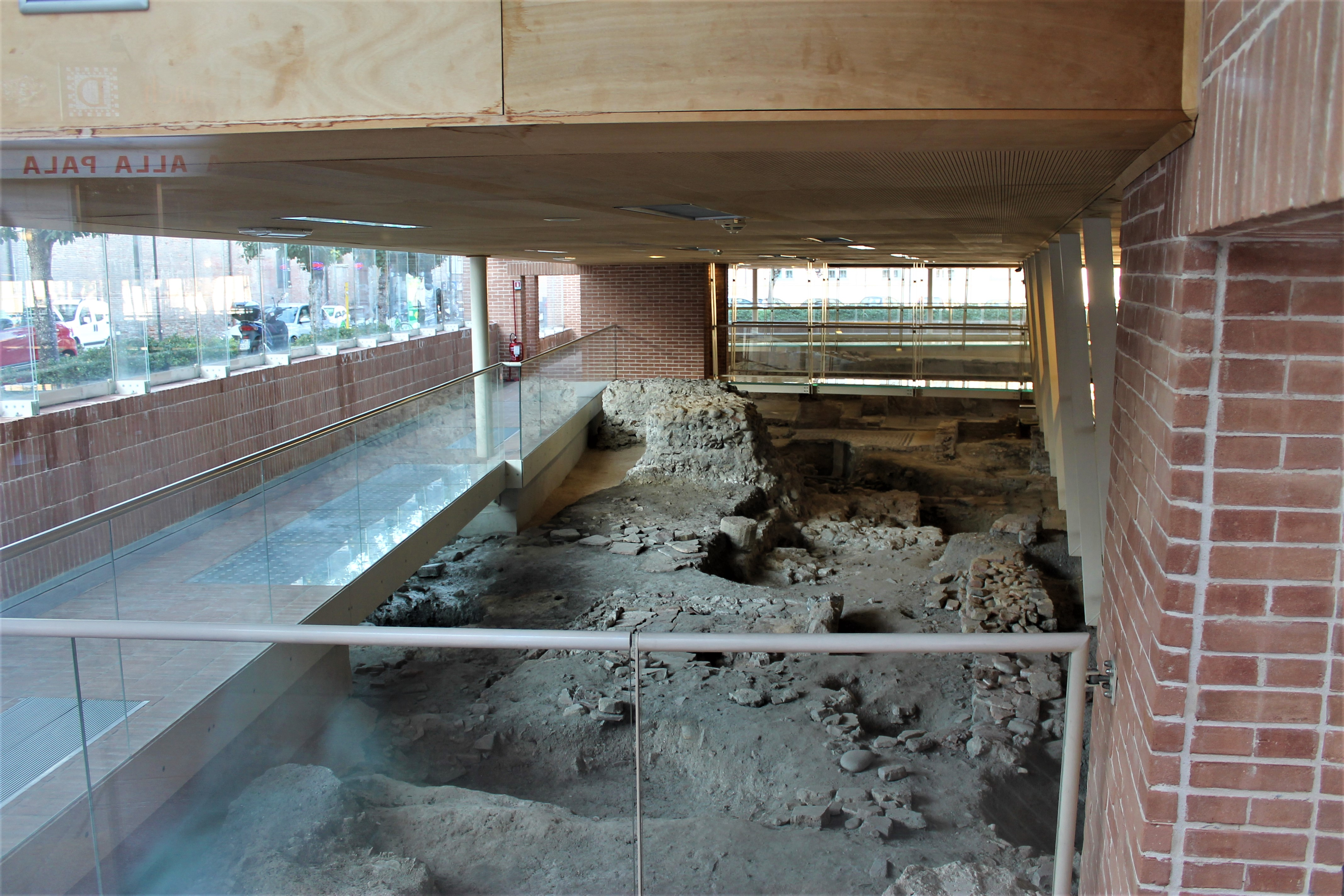 Domus del Chirurgo in Piazza Ferrari This is a photo of a monument which is part of cultural heritage of Italy.